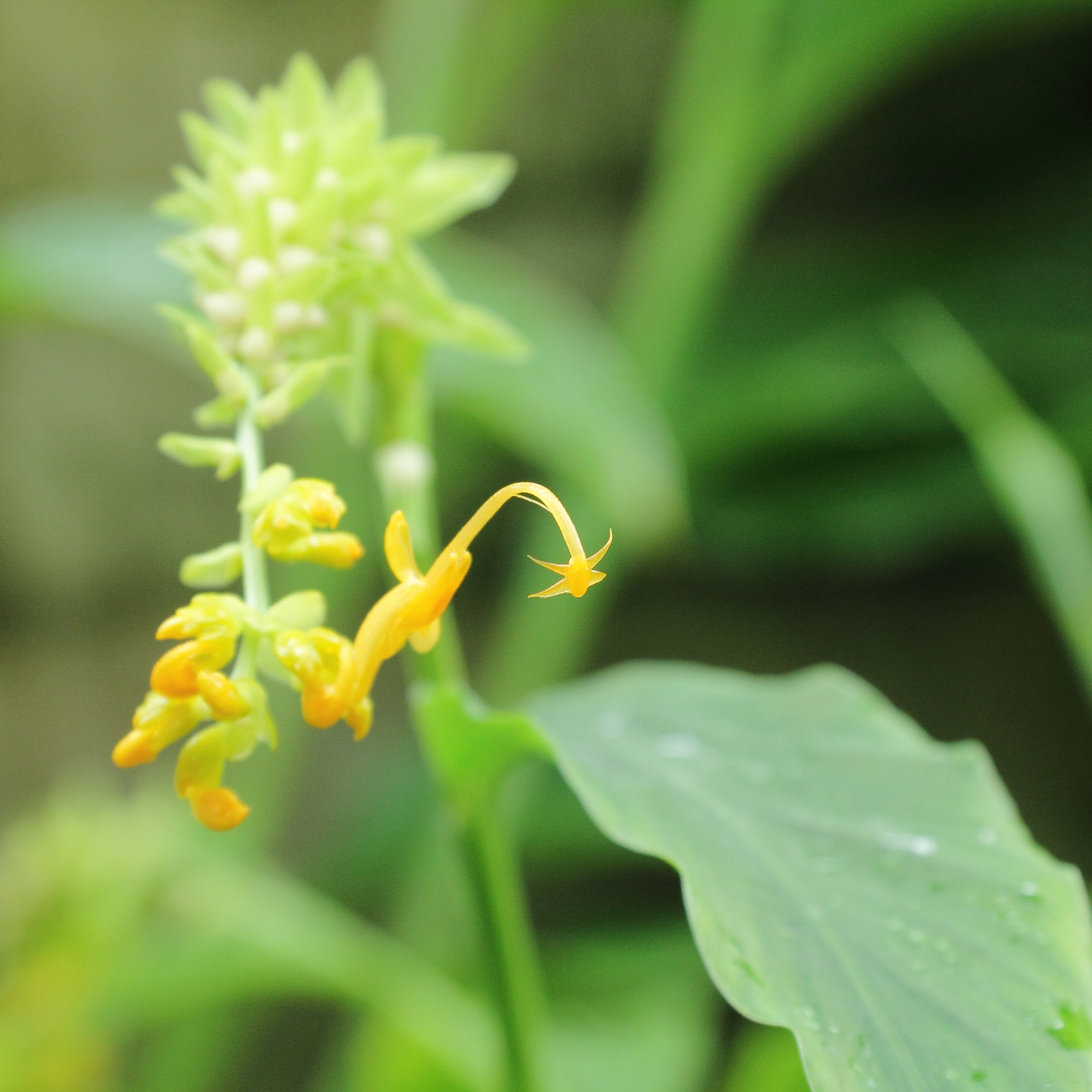 Globba schomburgkii at Uppsala Botanic Gardens